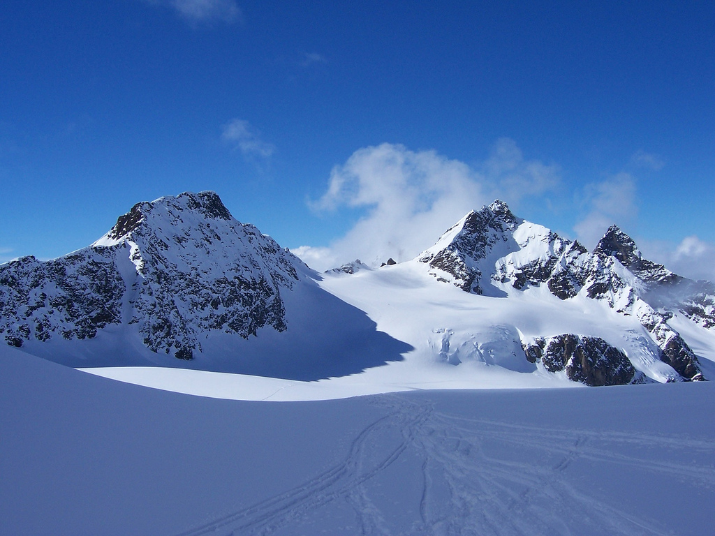 Signalhorn, Silvretta-Egghorn (rechts dahinter), Egghornlücke, Silvrettahorn, Schattenspitze